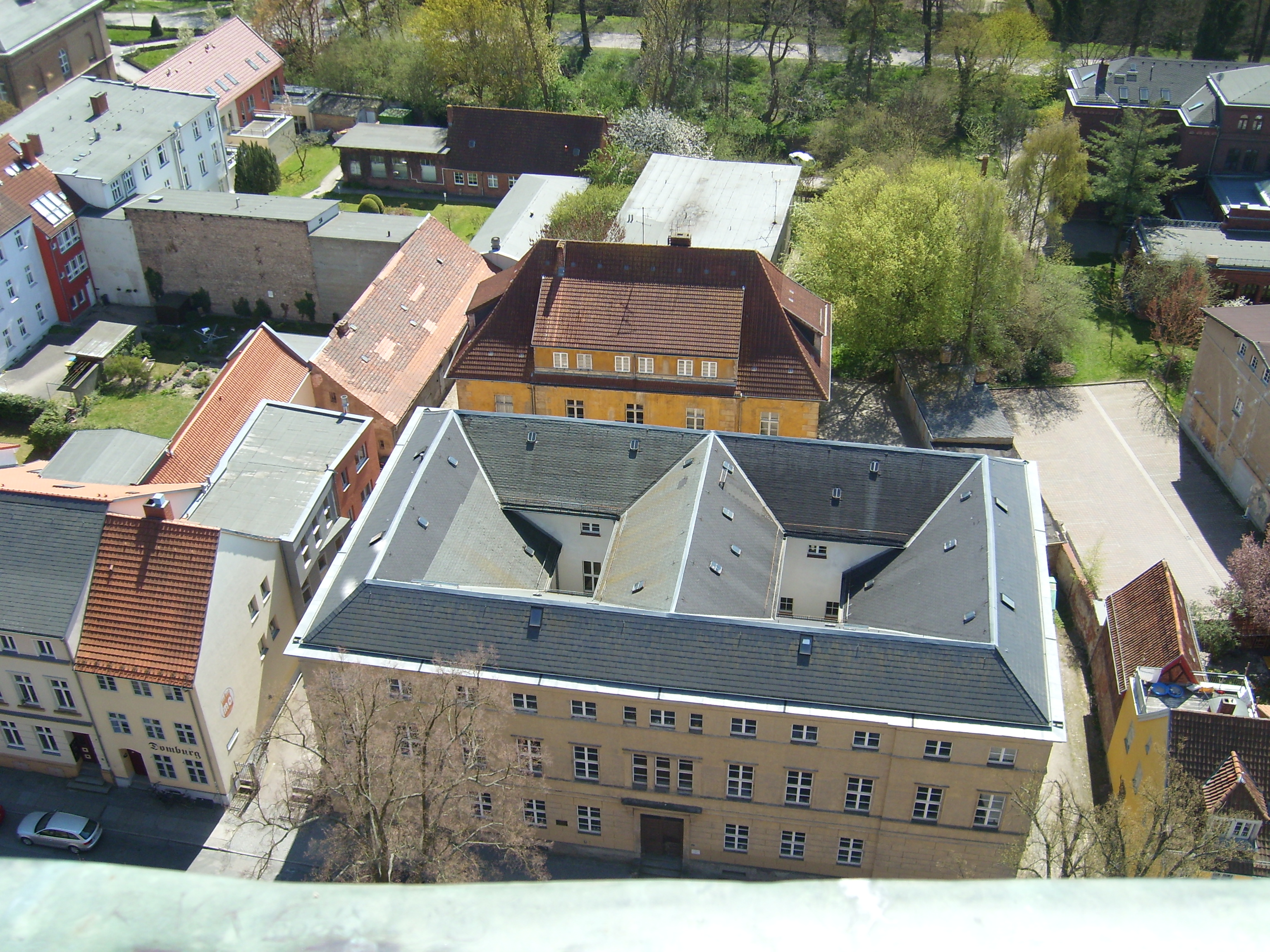 Blick von der Aussichtsplattform (auf 60 m Höhe) des Turms des Greifswalder Doms St. Nikolai nach Süden auf die Gebäude der Rechts- und Staatswissenschaftlichen Fakultät (Domstraße 20 und Hintergebäude Domstraße 20a)